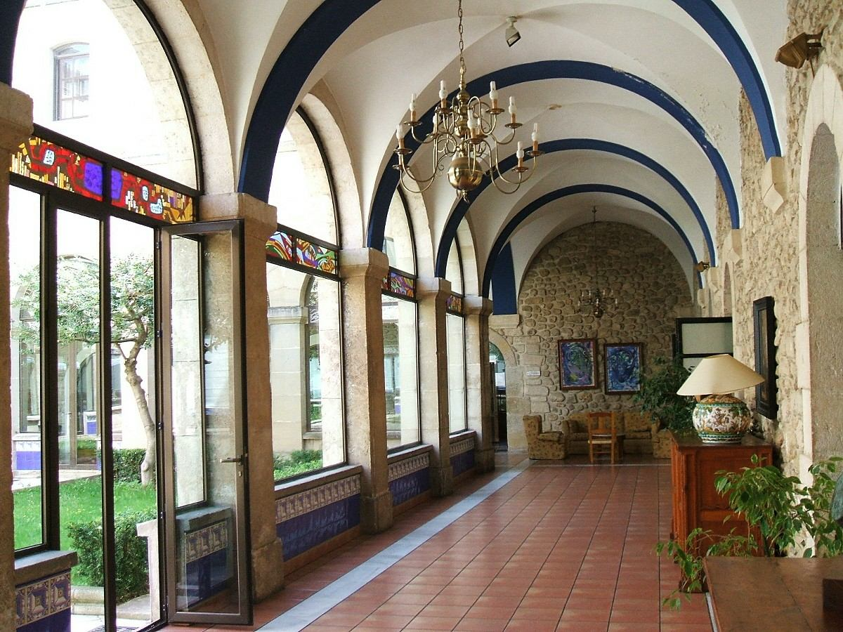 Claustro del antiguo Convento/Colegio de los Sagrados Corazones, Miranda de Ebro (Burgos)